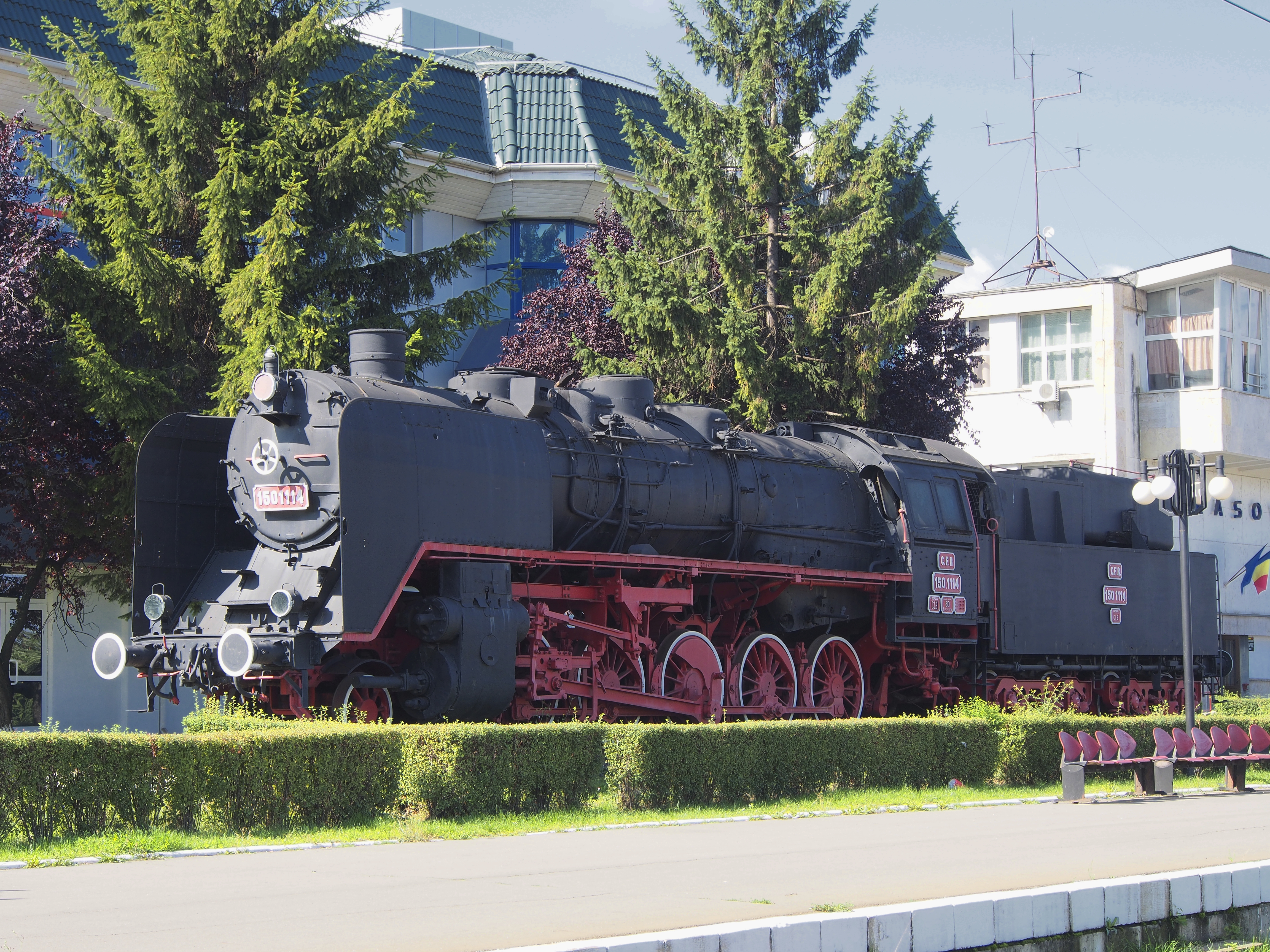 Brasov, Romania